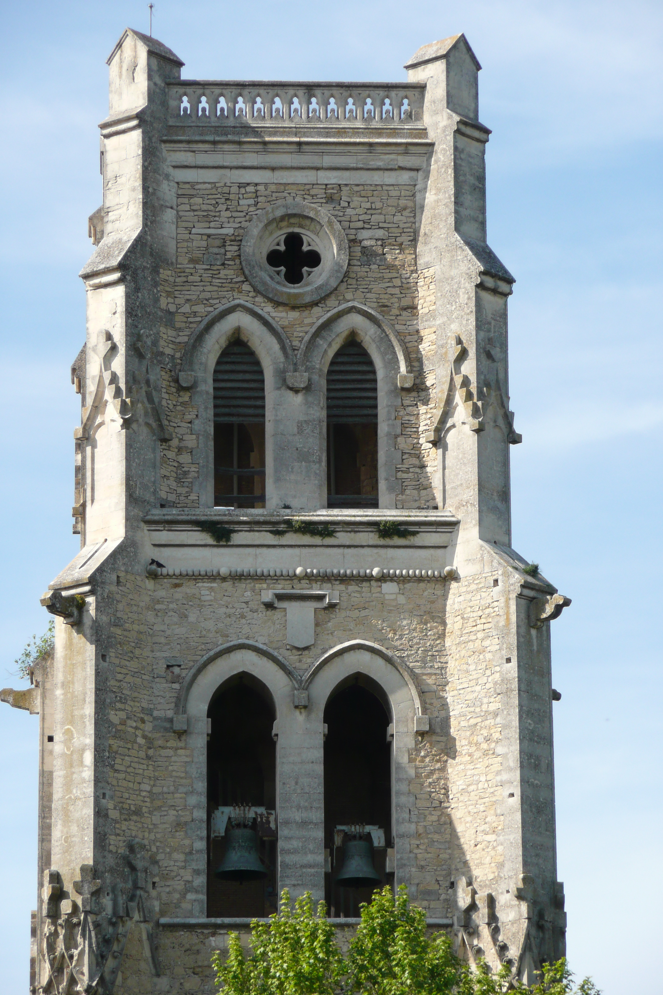 Eglise à Pont-Saint-Esprit.